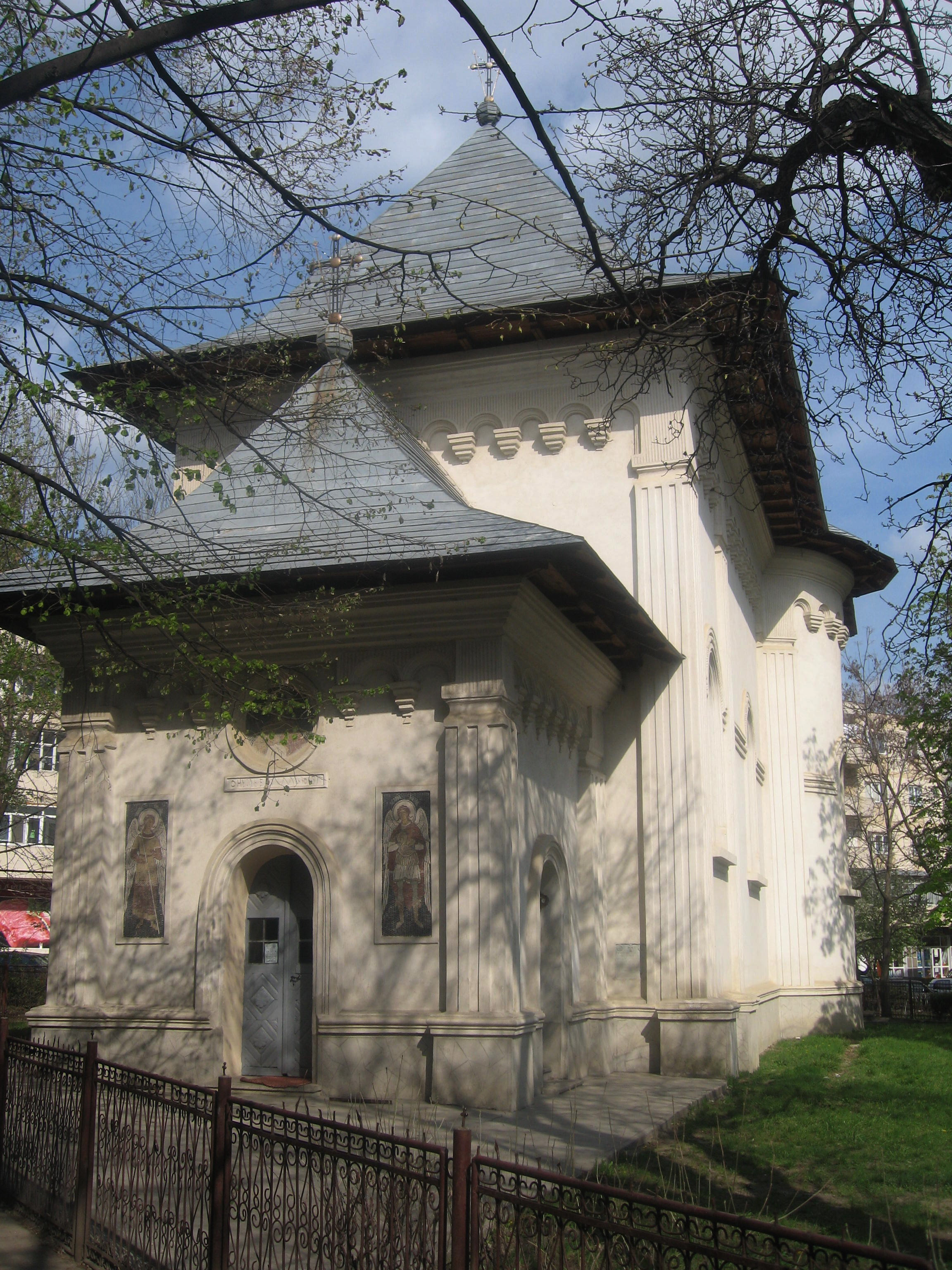 Biserica Sfinții Voievozi din Huși 01